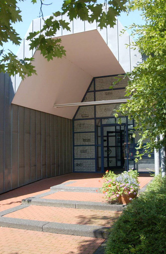 Landesarchiv NRW Staats- und Personenstandsarchiv Detmold: Eingang